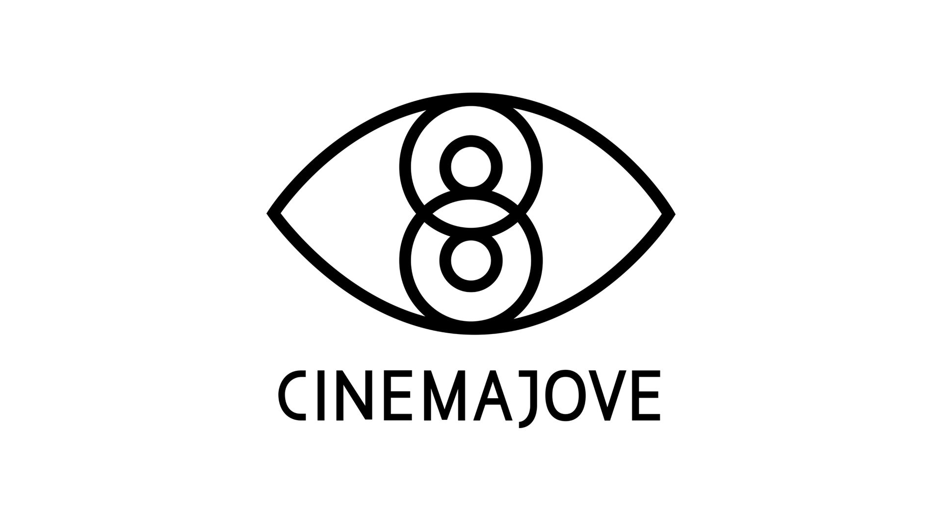 Logotype de Cinema Jove